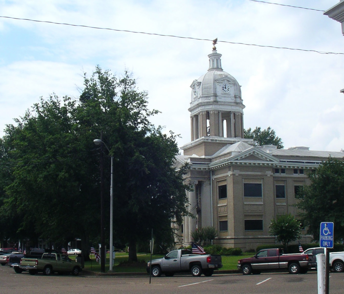 Gerichtsgebäude in Houston, MS